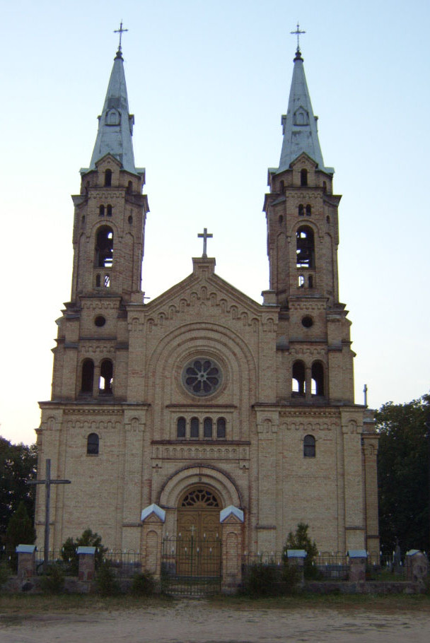 Беларуская (тарашкевіца): Касьцёл Сьвятога Міхаіла Арханёла ў Белагрудзе